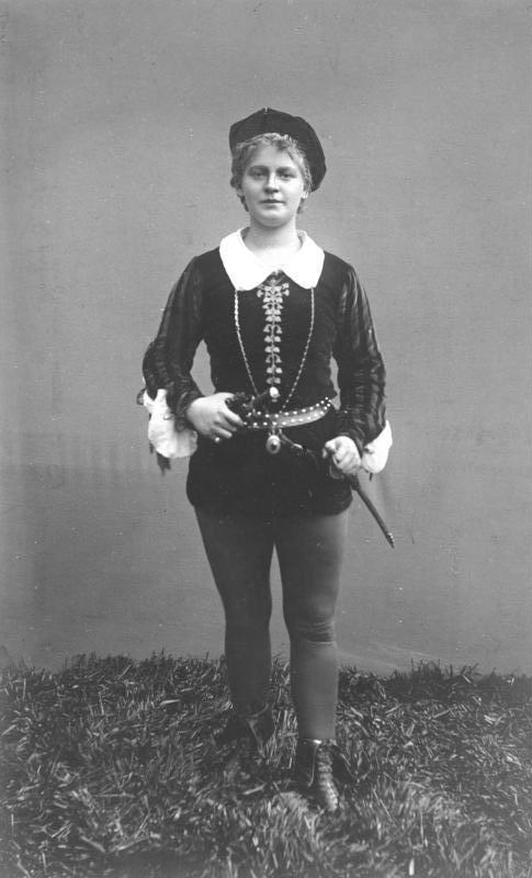 Lucie Höflich ADN-ZB/Archiv Lucie Höflich, Schauspielerin, geb. 20.2.1883 in Hannover gest. 9.10.1956 in Westberlin Die Schauspielerin Lucie Höflich, Mitglied des Deutschen Theaters in Berlin, als Viola in Shakespeares Lustspiel "Was ihr wollt". (Aufn 1907) Abgebildete Personen: Höflich, Lucie: Schauspielerin, Leiterin der Schauspielschule Berlin, Deutschland